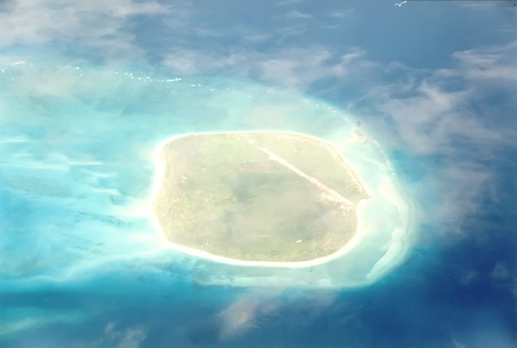 Iles Glorieuses, Océan Indien